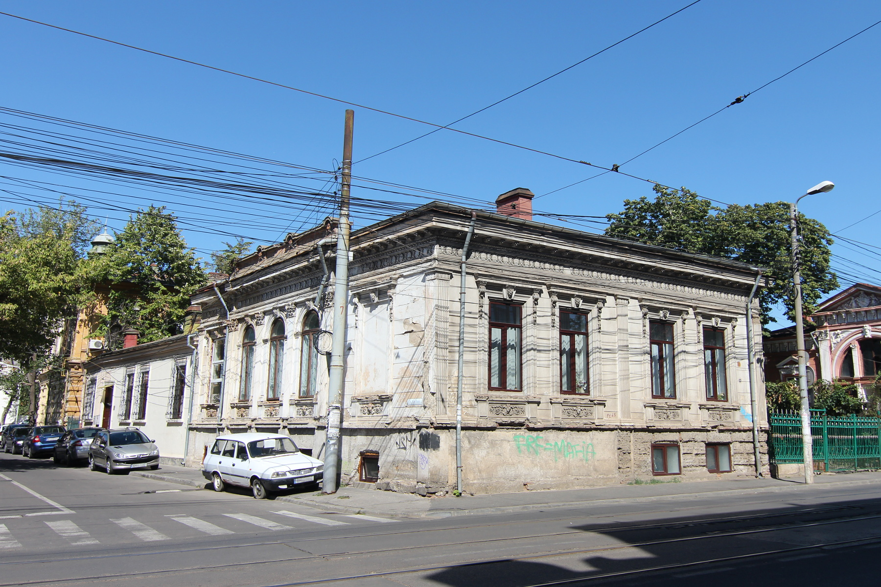 Casă pe Calea Călărașilor